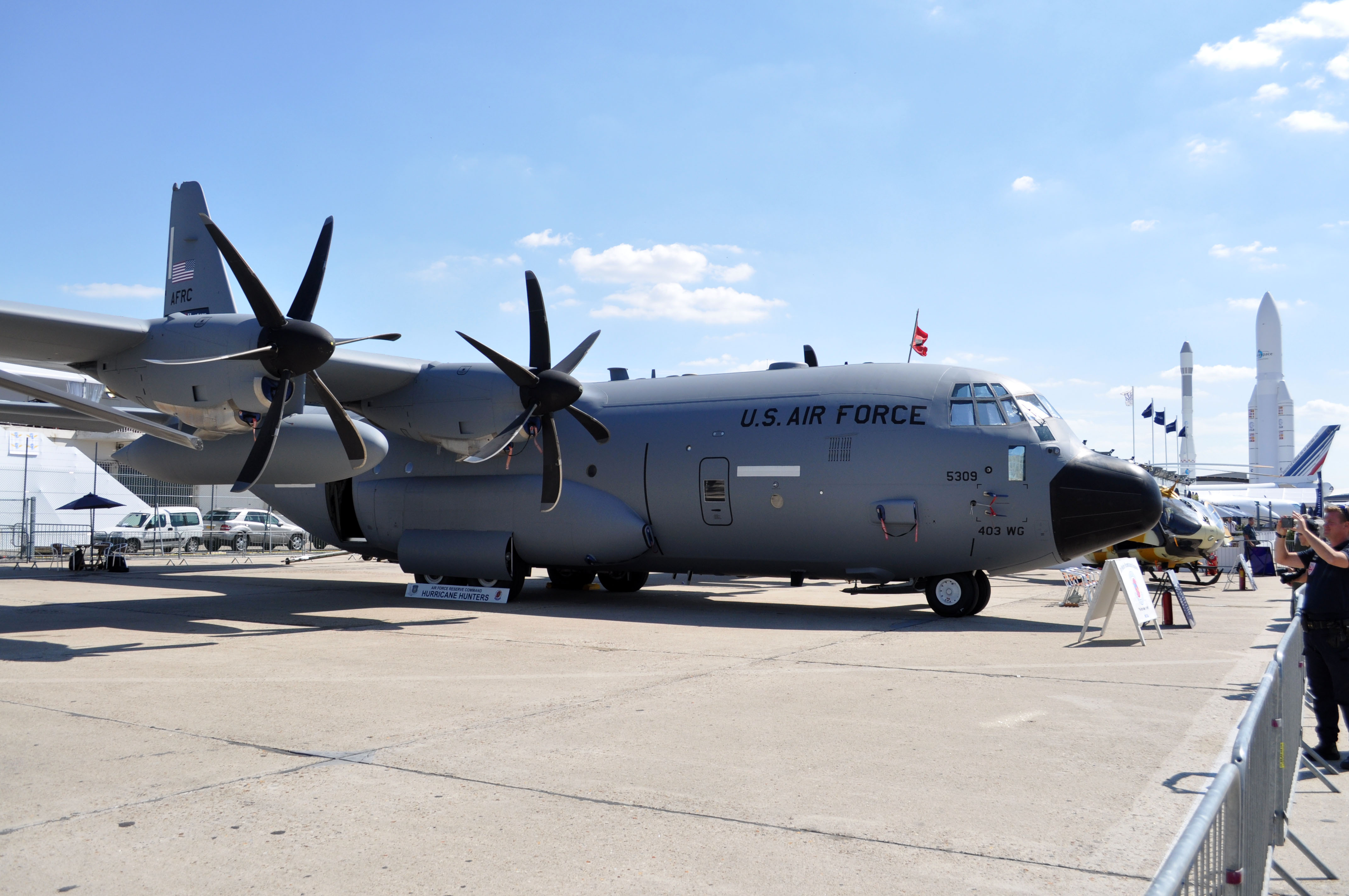 MSN 5501 WC-130J USAF 53RD WRS LBG AIRPORT SIAE 2015